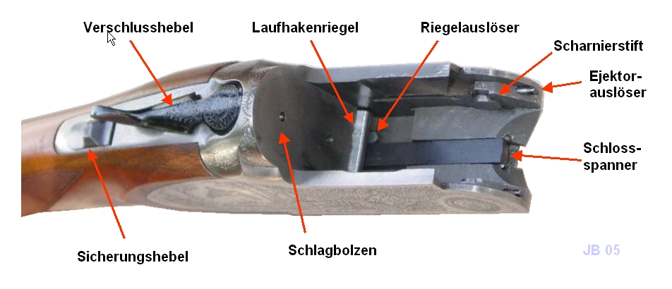 Basküle einer Bockdoppelflinte mit Erläuterungen